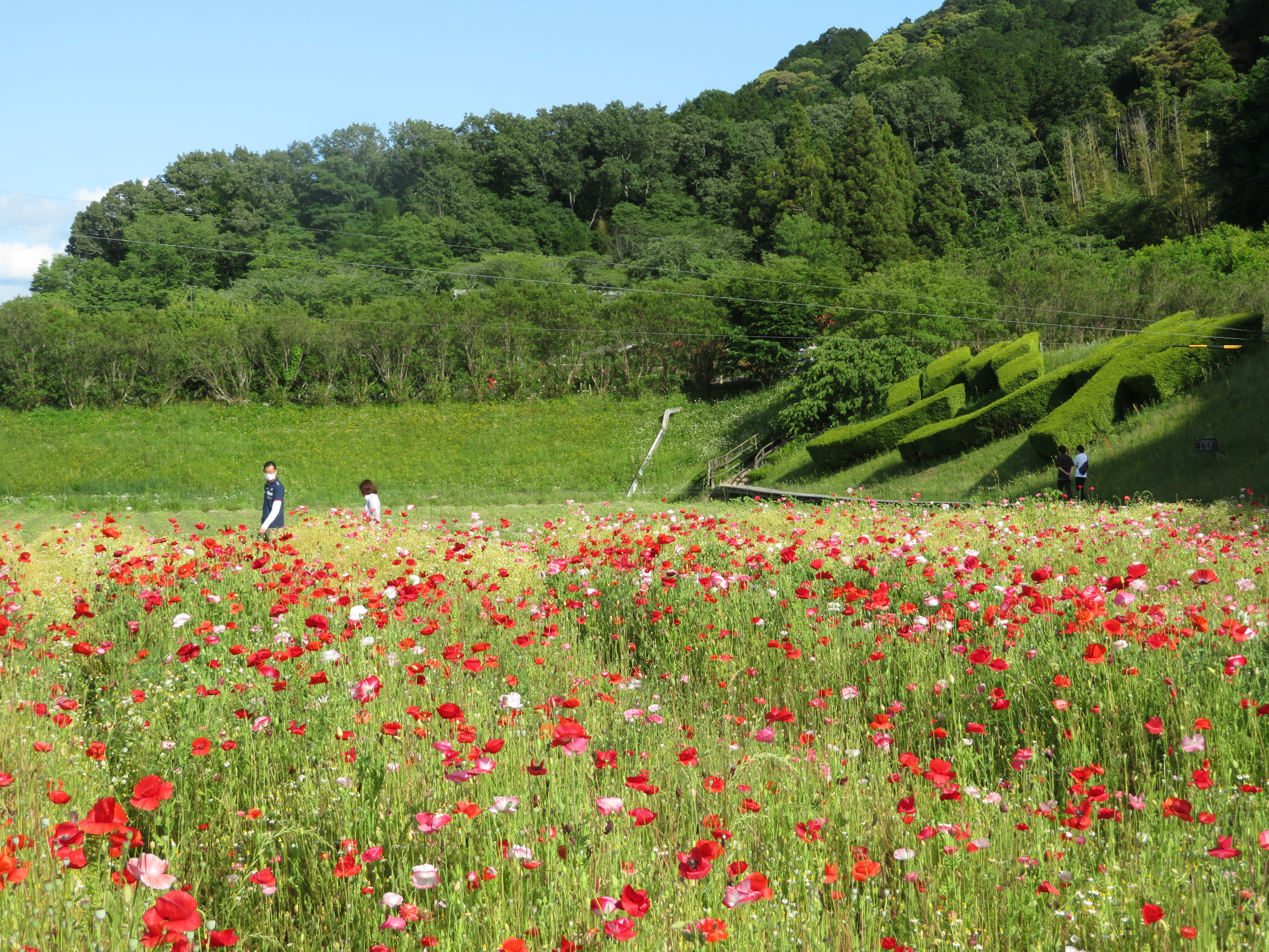 奥殿陣屋の花畑（岡崎市奥殿町）